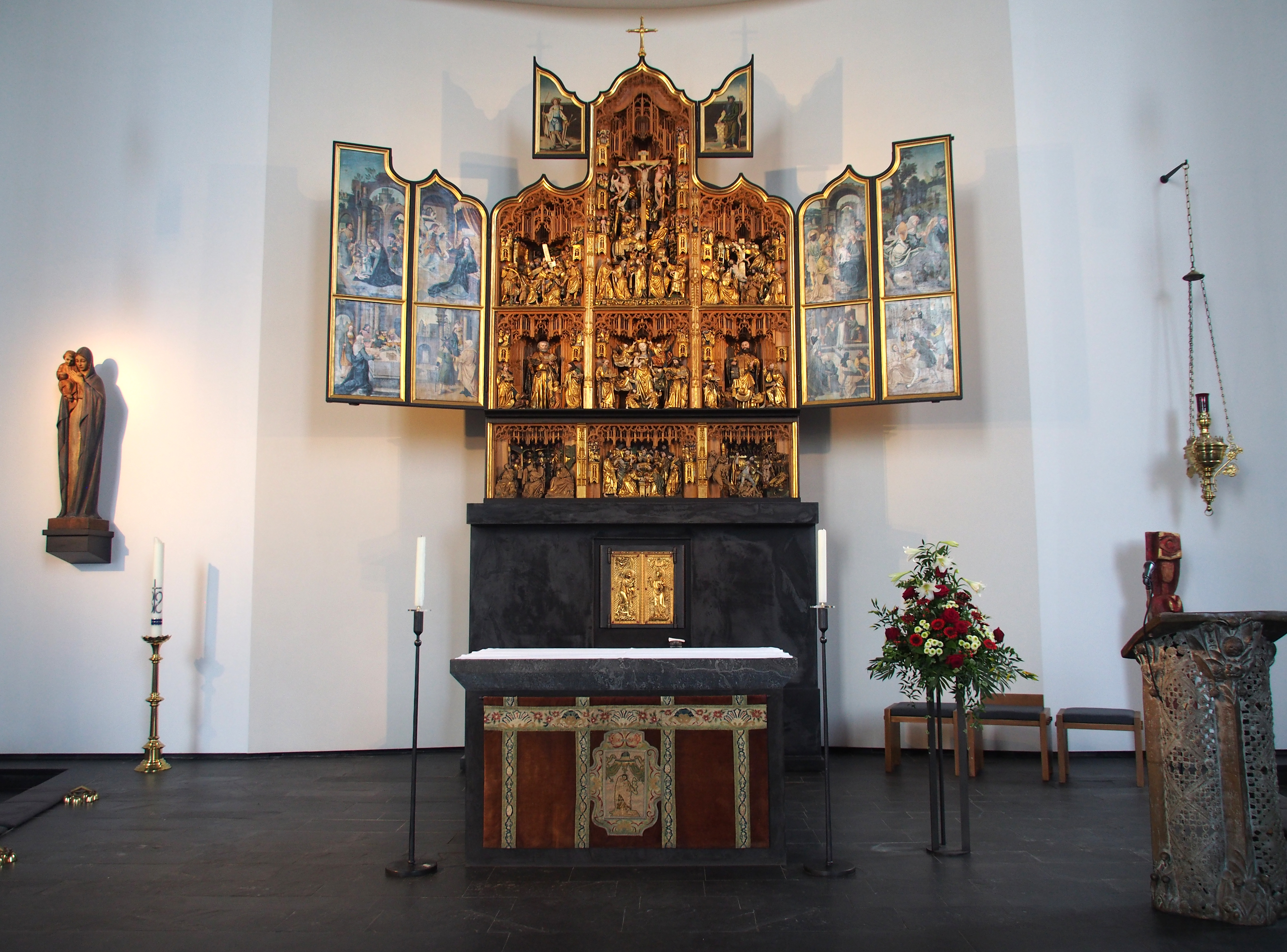 Flandrischer Schnitzaltar (um 1500), Hauptaltar in der Katholische Pfarrkirche St. Peter, Zülpich